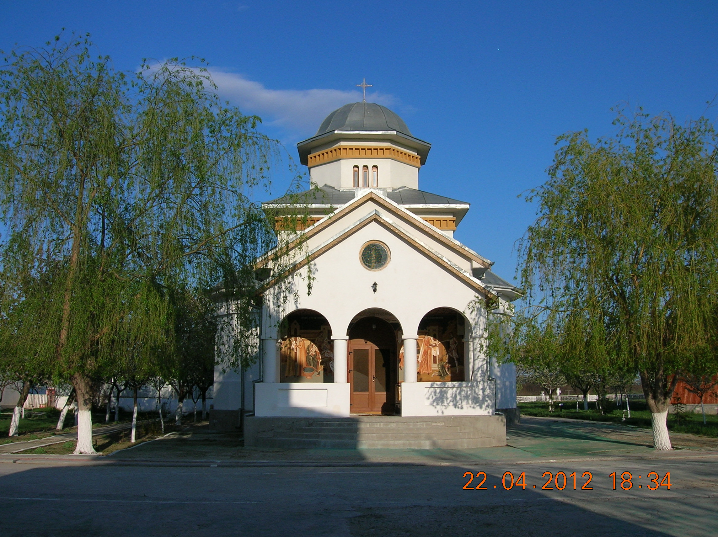 Mănăstirea Măxineni, Jud. Brăila, România - Biserica nouă a mănăstirii